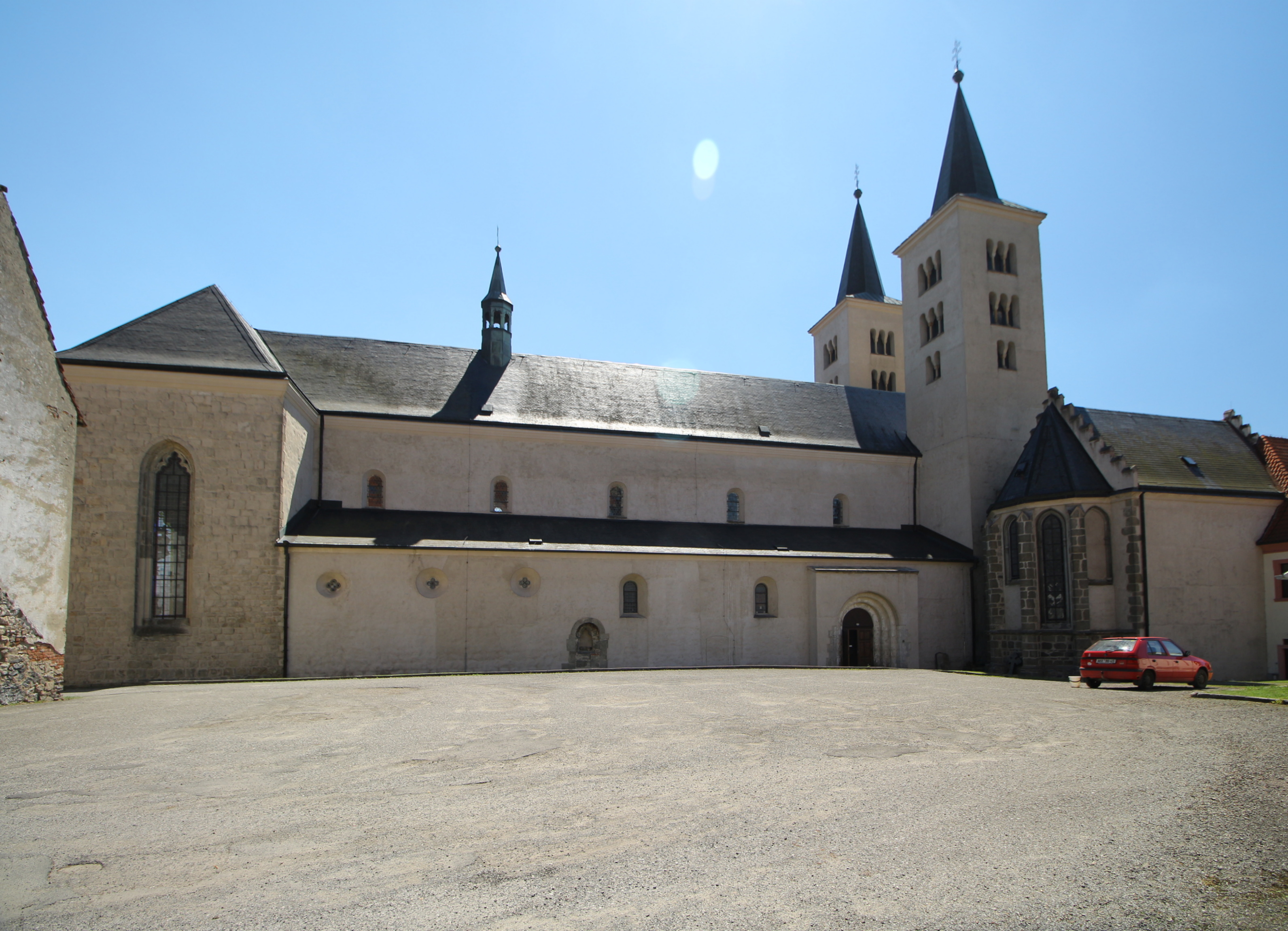 Klášterní bazilika Navštívení Panny Marie v Milevsku